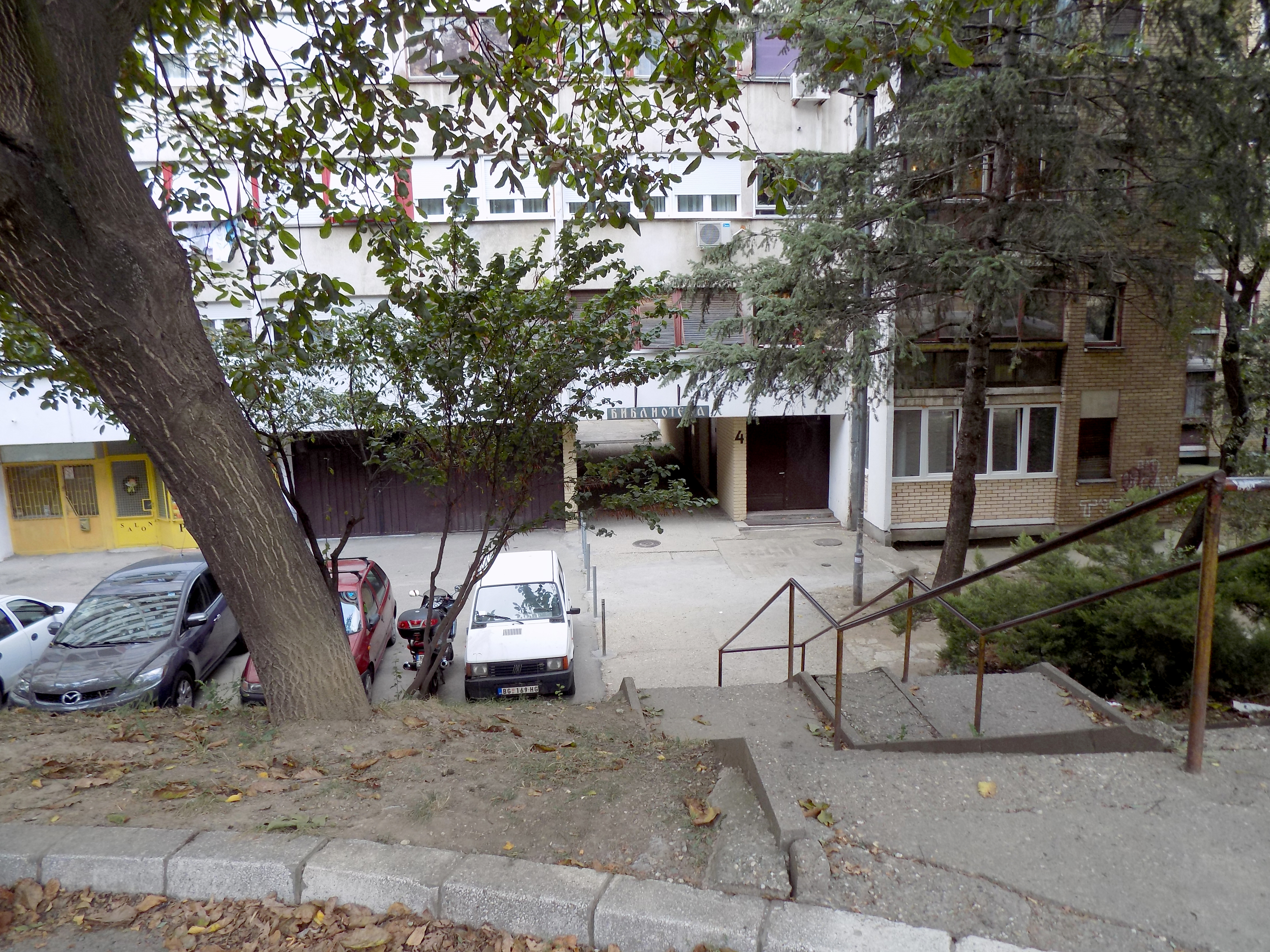 Biblioteka "Dragiša Vitošević", Mirijevo (Beogradska opština Zvezdara) - Biblioteka u mirnom stambenom kvartu